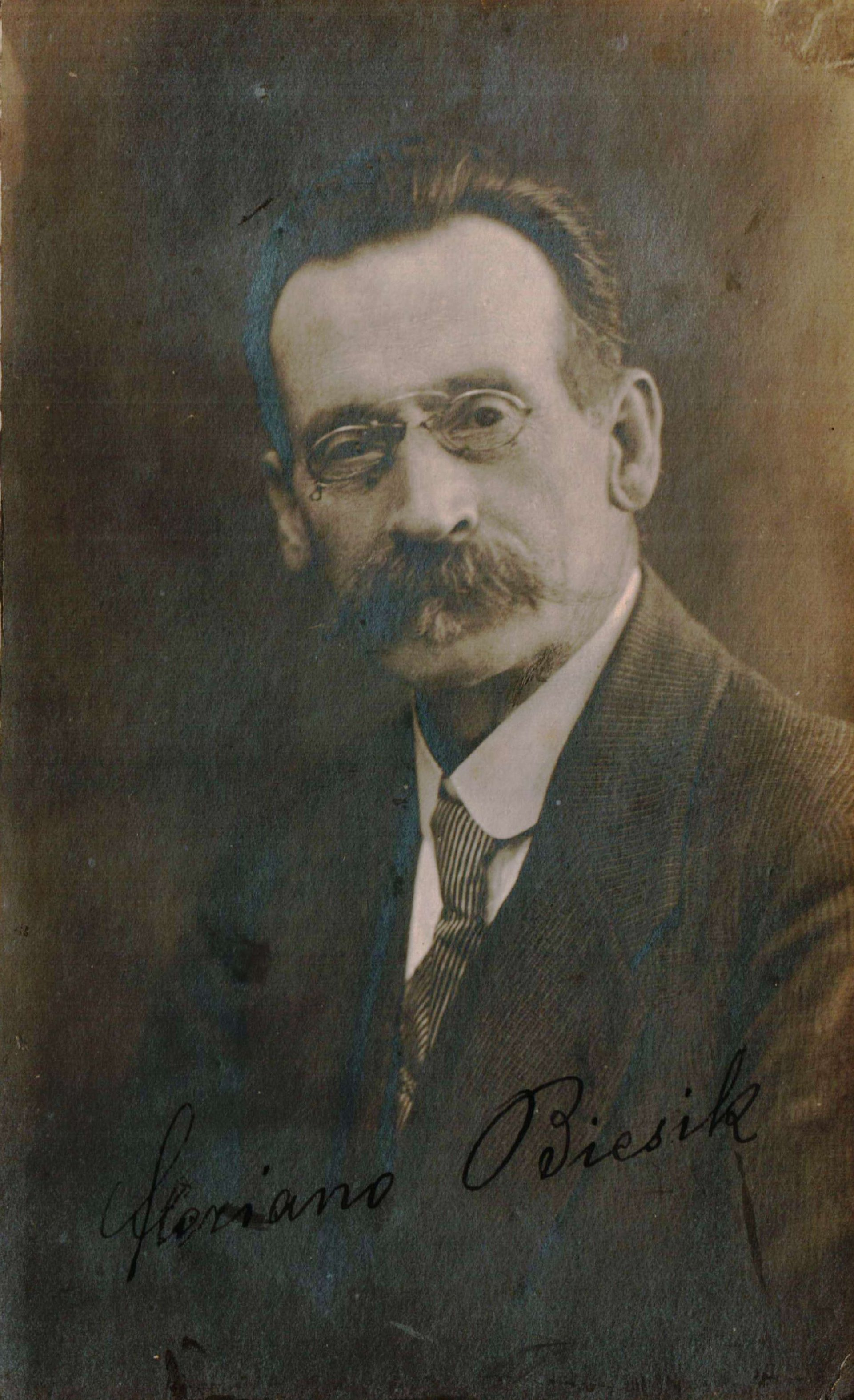 Florian Biesik (1849–1926), railway official, Wymysorys language writer.